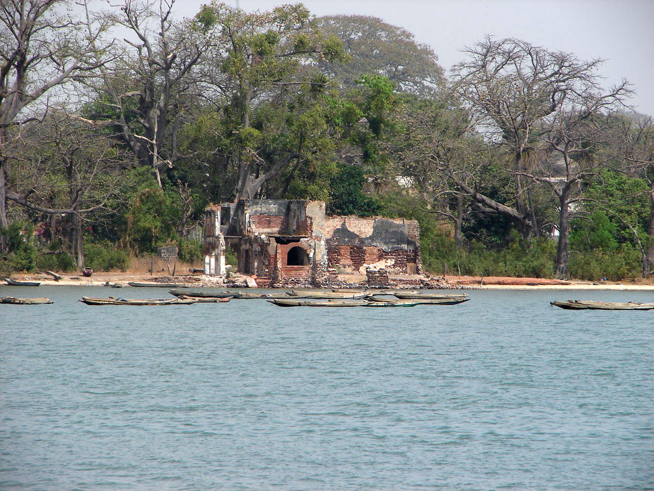 CFAO Building, Albreda, Gambia